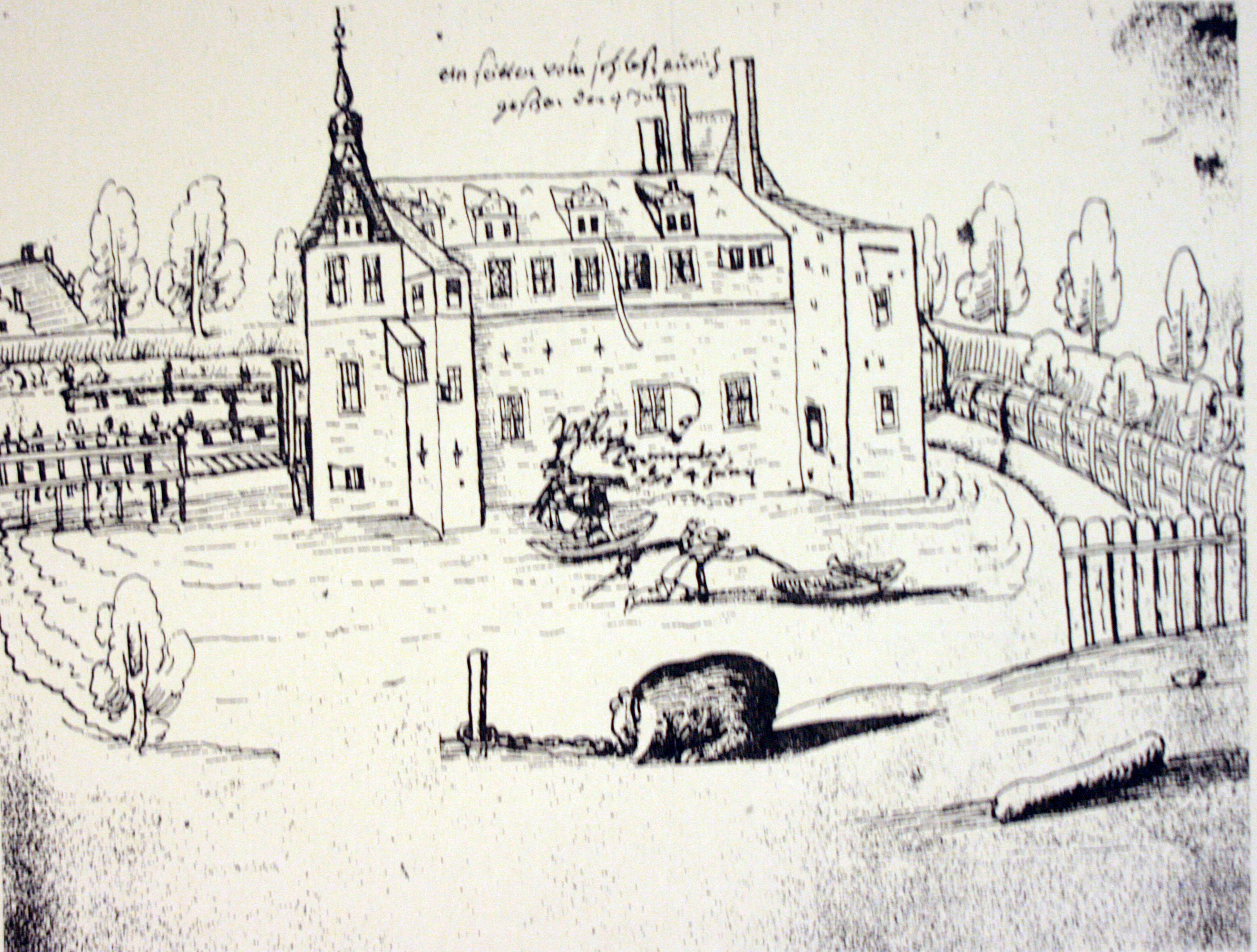 Aurich, Hand Drawing, 1632